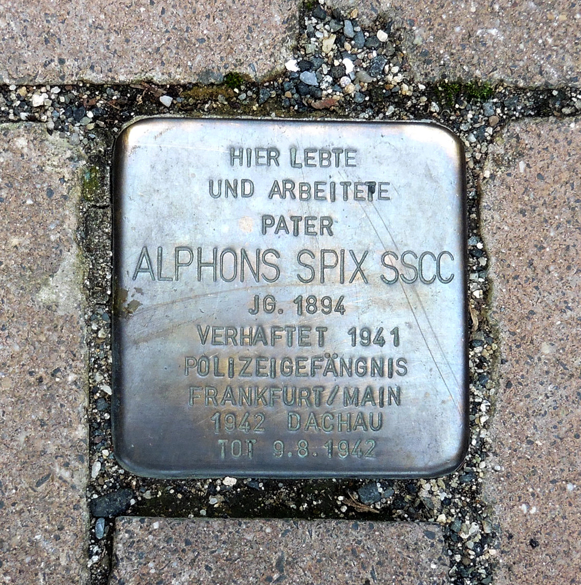 Stolperstein für Pater Alfons Spix vor dem Kloster Arnstein, Rheinland-Pfalz. Inschrift: Hier lebte und arbeitete Pater Alphons Spix SSCC Jg. 1894 verhaftet 1941 Polizeigefängnis Frankfurt/Main 1942 Dachau tot 9.8.1942